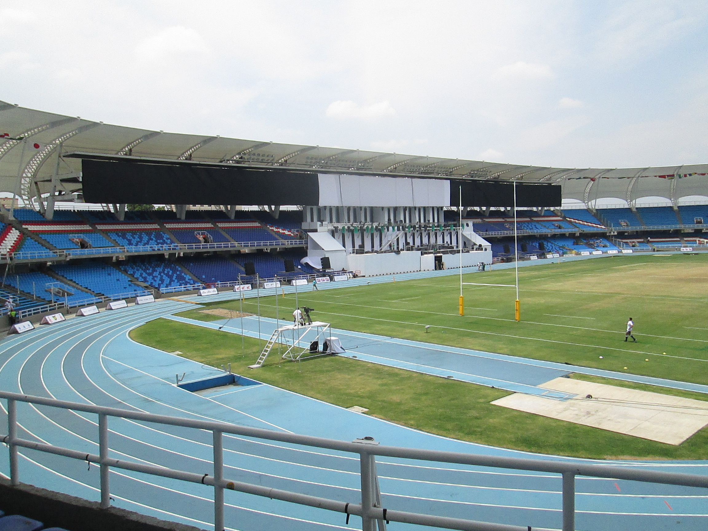 Estadio previo al inicio del Rugby sevens.